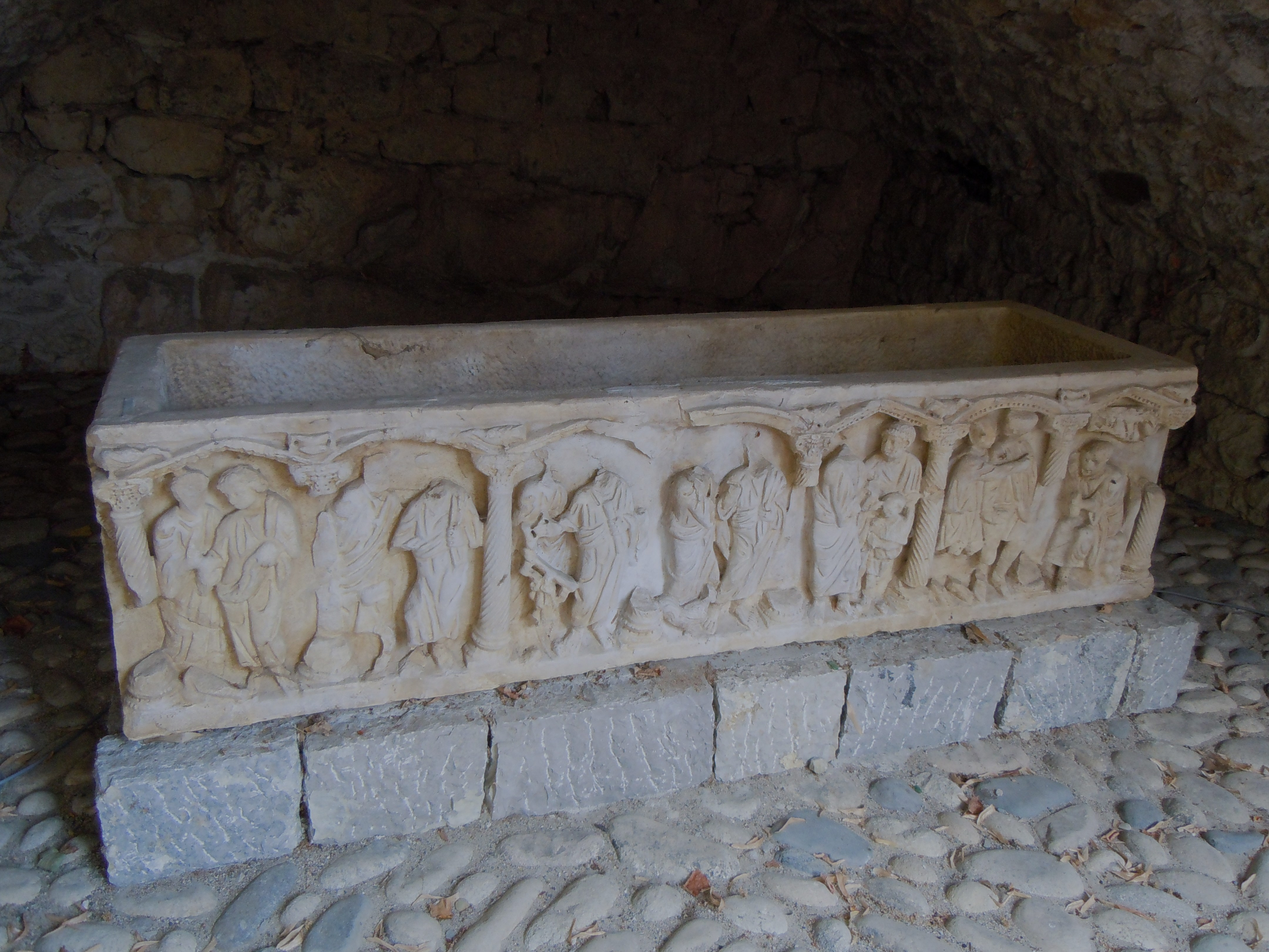 Sarcophage de Balazuc - IVeme siècle - Copie située à la mairie de Balazuc